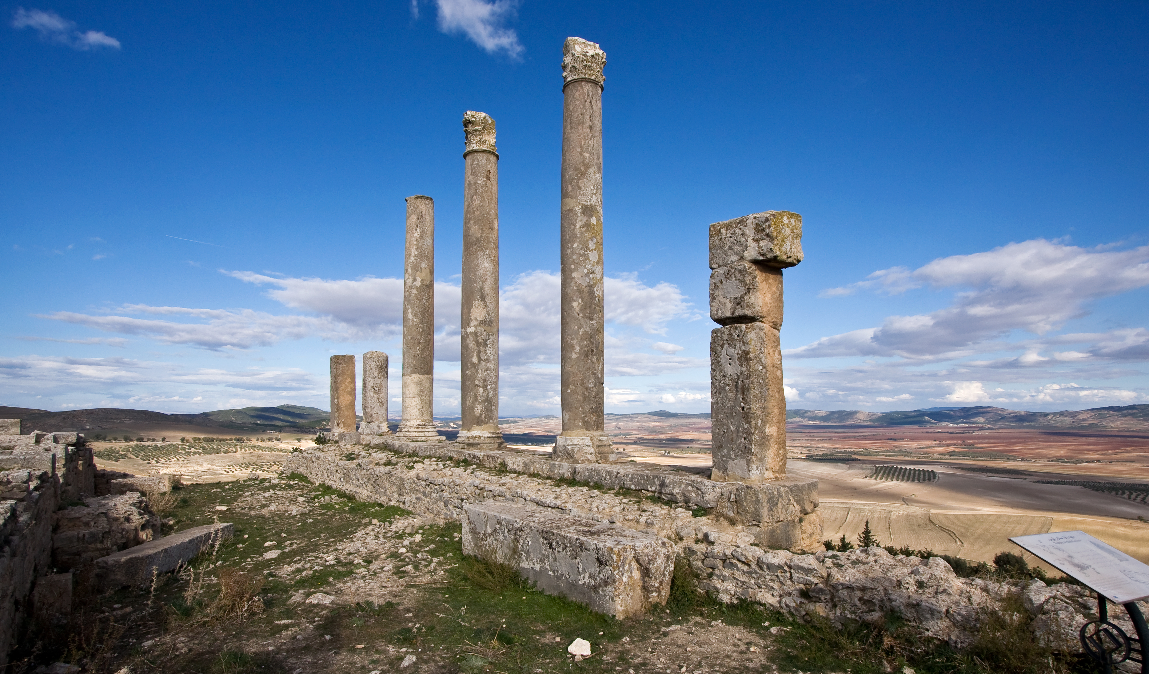 Ruines du temple de Saturne, consacré en 195 pour le salut de Septime Sévère, Albir et Julia Domna sur la colline du Nord (colonnes, inscriptions, revêtements en plâtre orné), Dougga